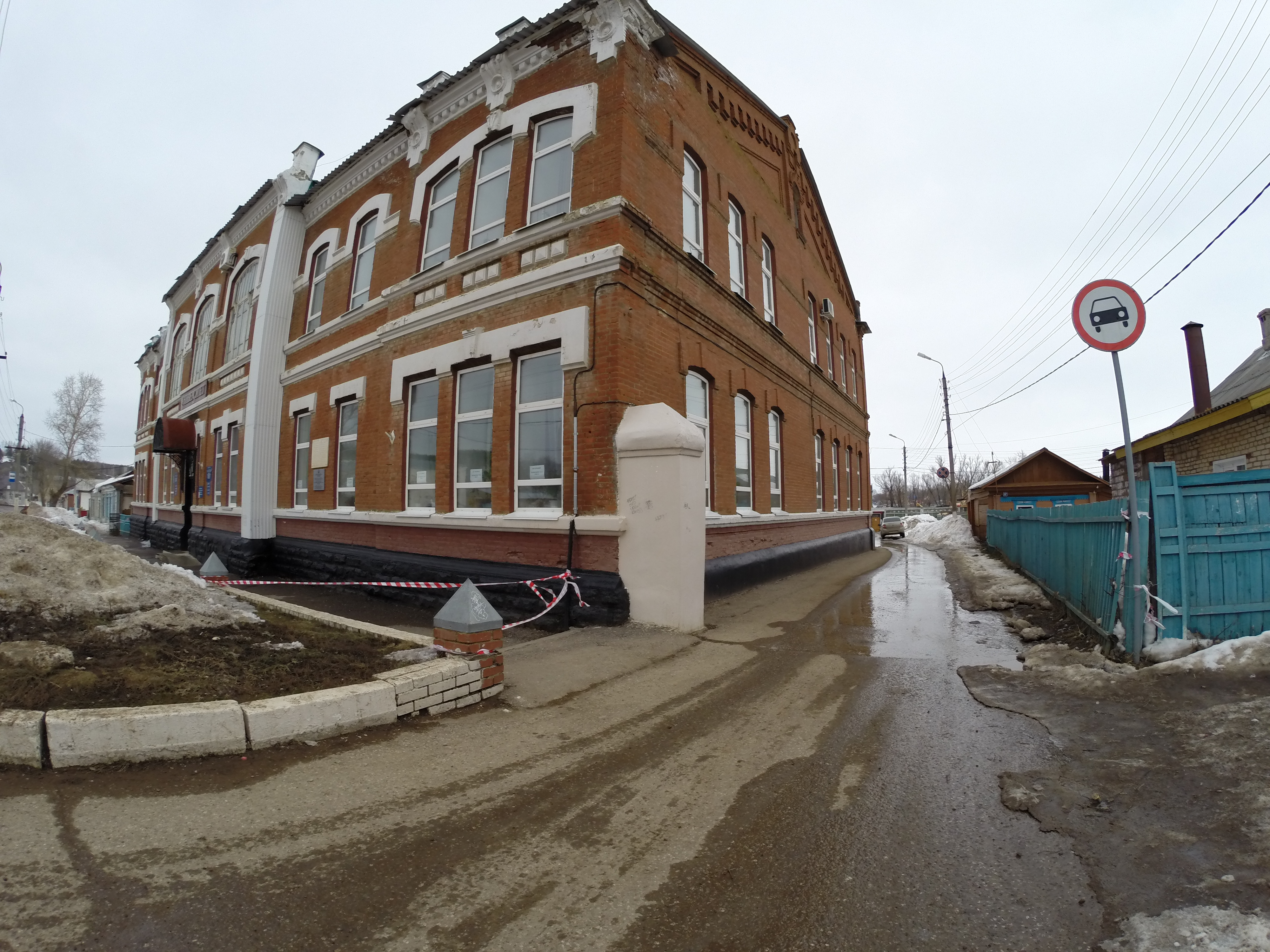 Филиал Самарского государственного архитектурно-строительного университета, Белебей